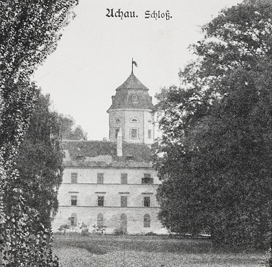 Schloss Achau